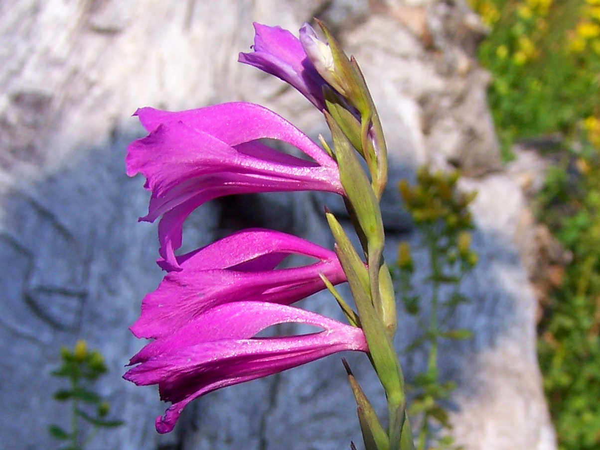 Gladiolus imbricatus (pl. mieczyk dachówkowaty)